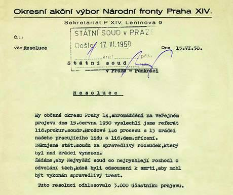 "Rezoluce" reagující na projev soudkyně Brožové.